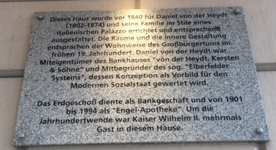 Erinnreungstafel an Daniel von der Heydt